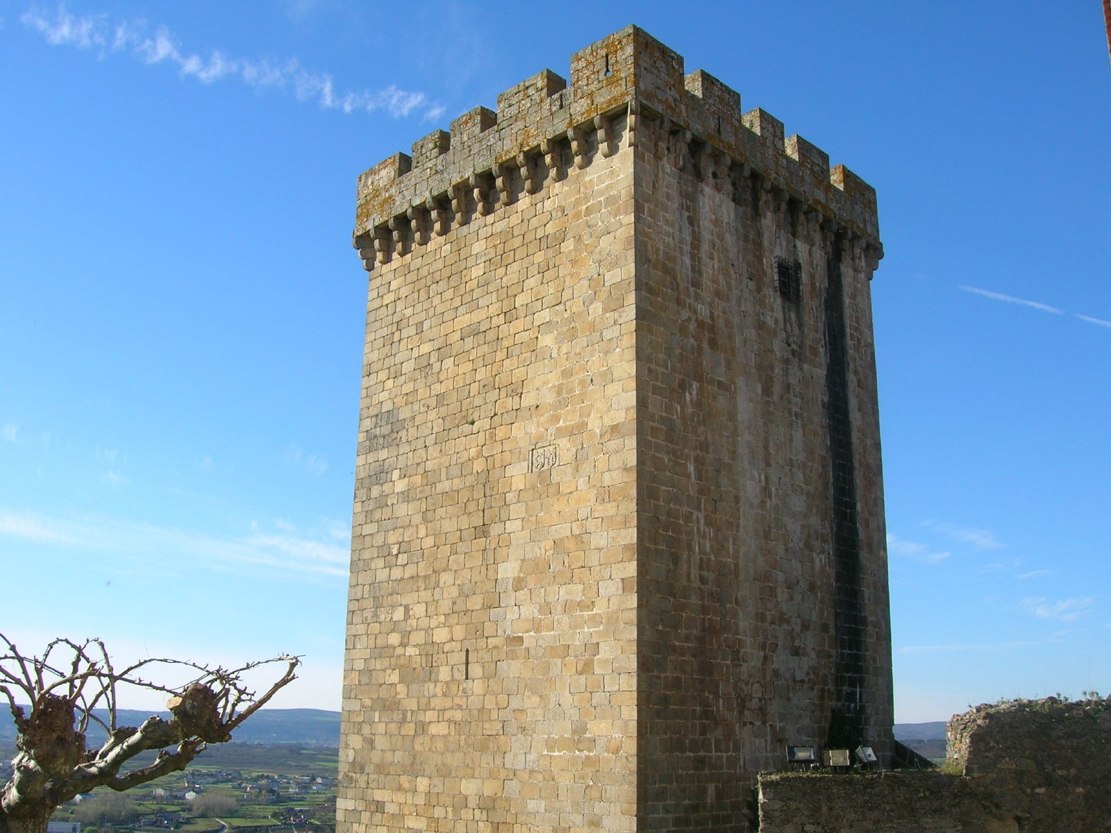 Esta torre perteneció a la fortaleza construida en el siglo XII por el Conde de Lemos. Hoy en día después de su restauración, está abierta al público como museo.